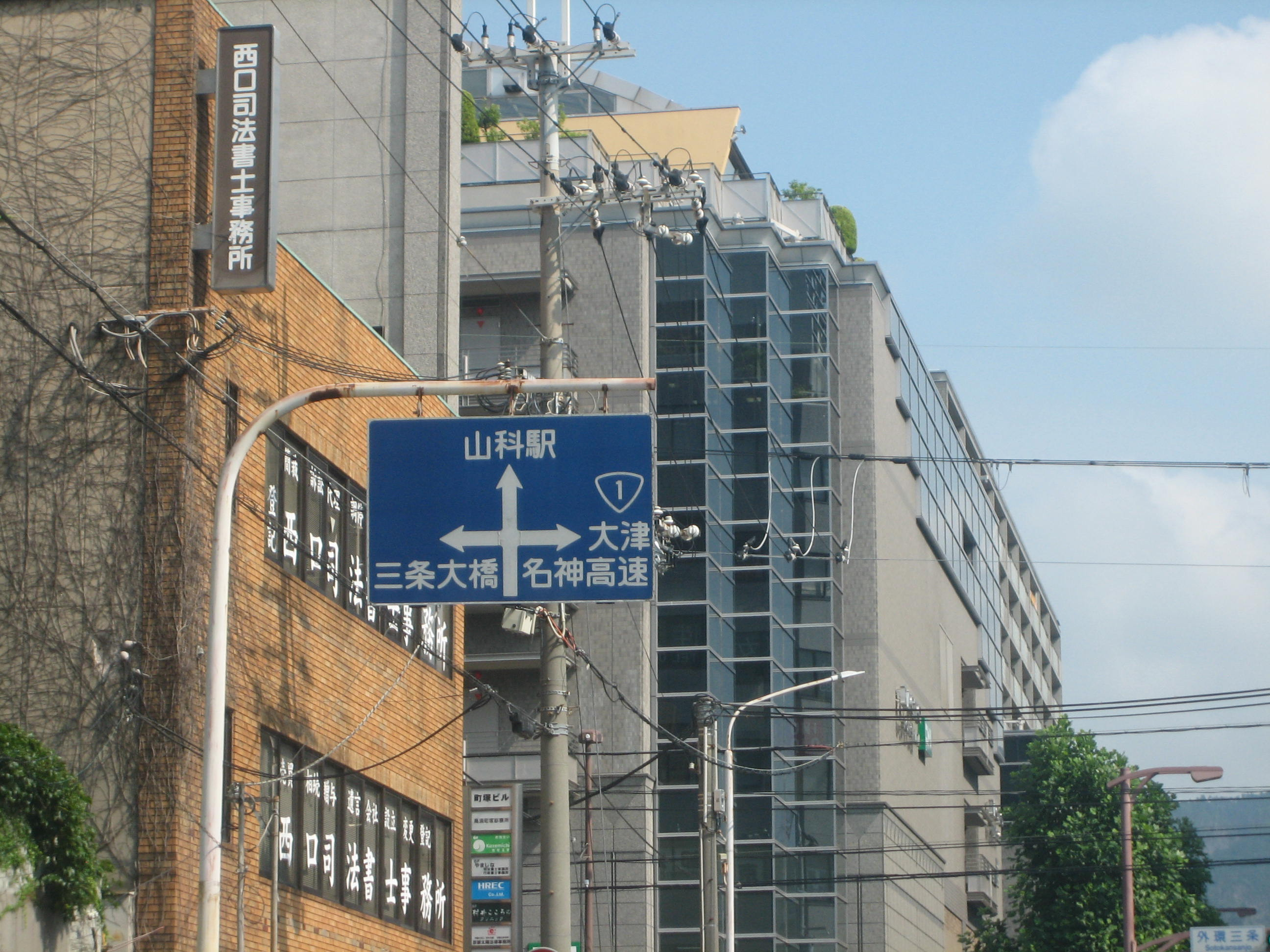 外環三条交差点